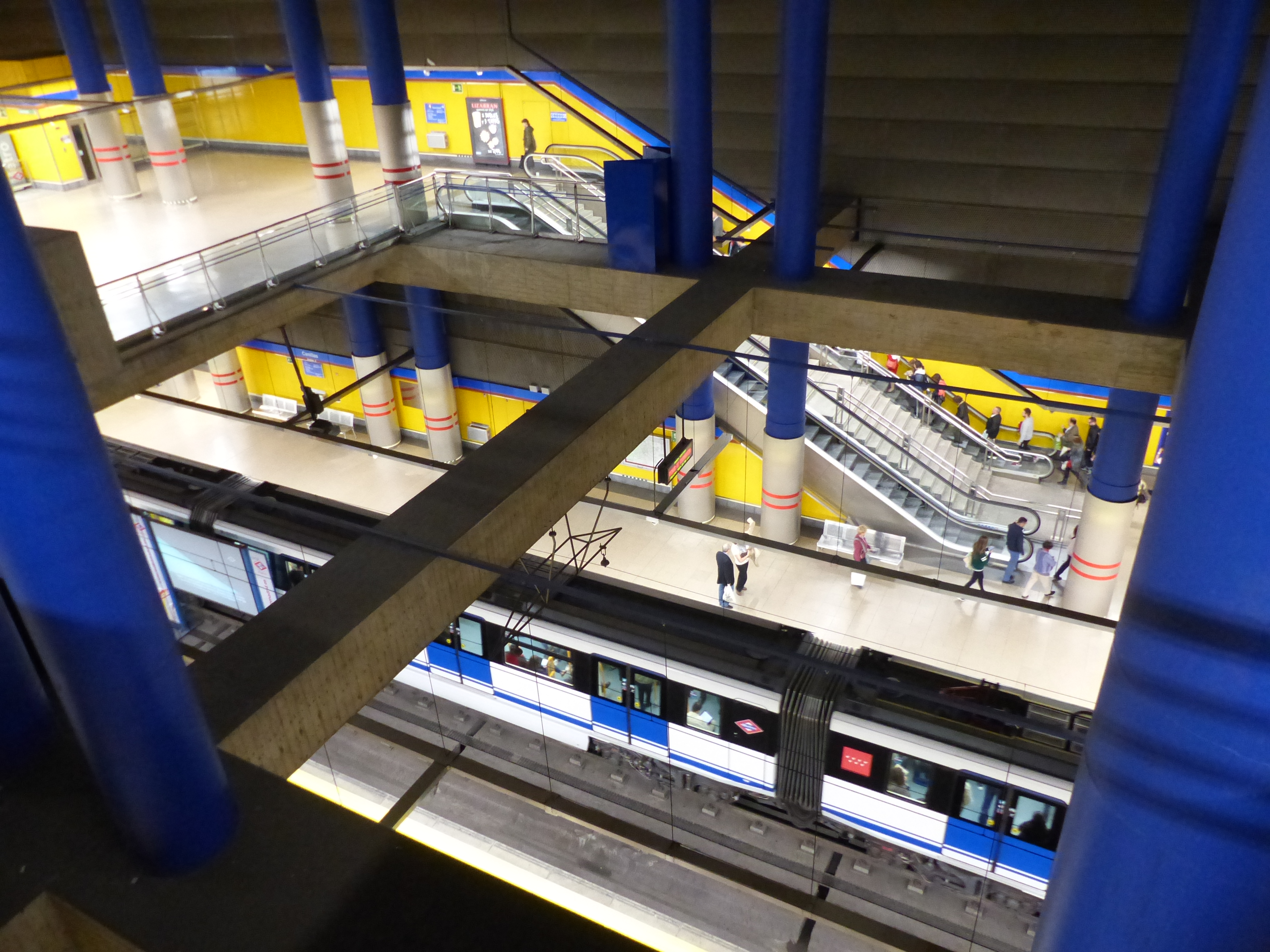 Vista en alto.